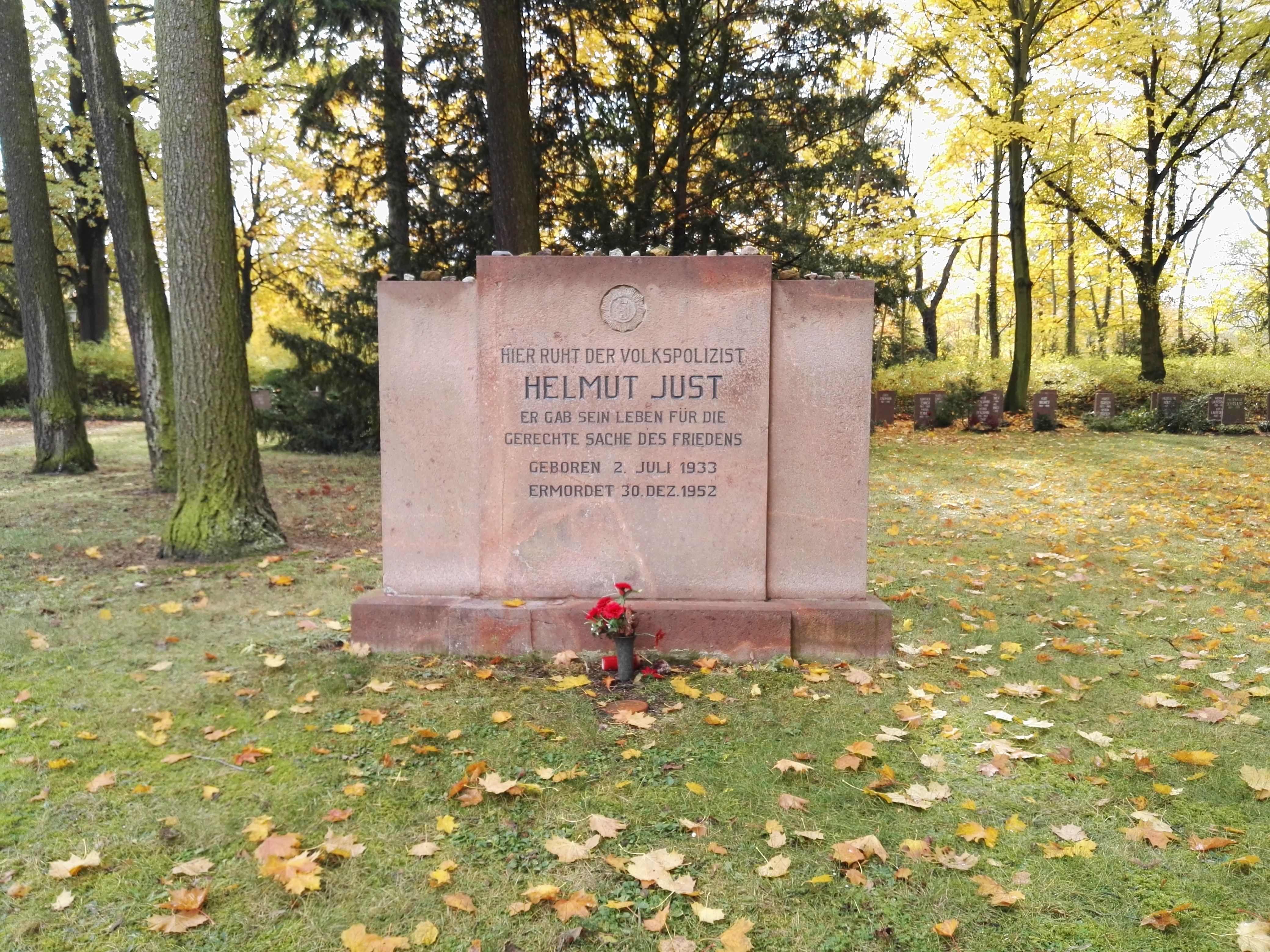 Grab von Helmut Just auf dem Sozialistenfriedhof des Zentralfriedhofs Friedrichsfelde